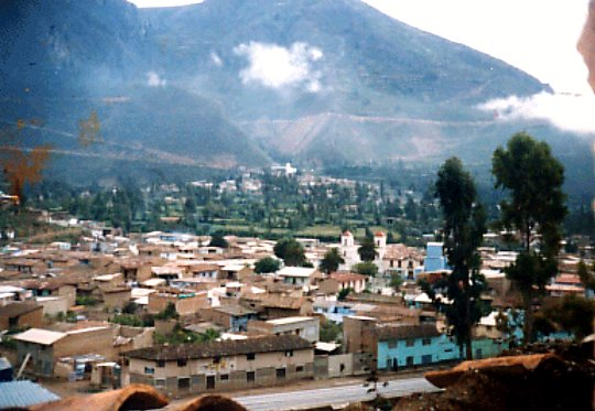 la ciudad de Acobamba Tarma, Peru